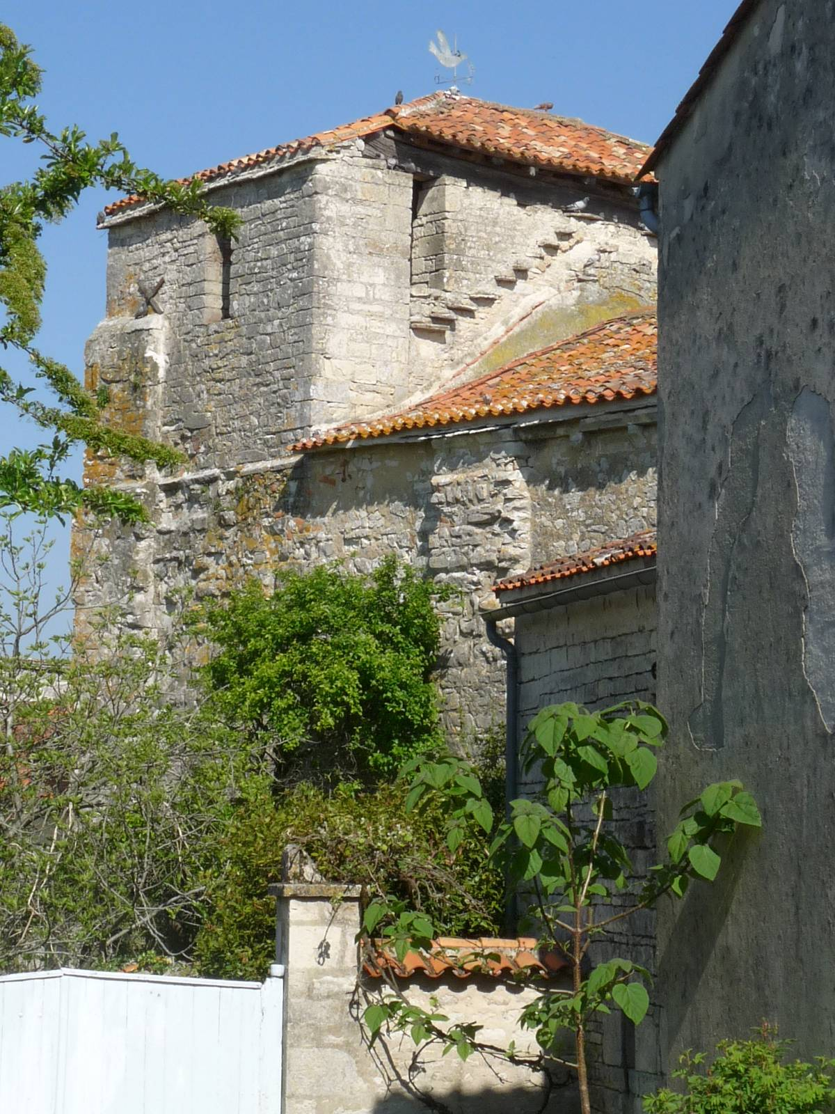 Eglise de Villognon, Charente, France